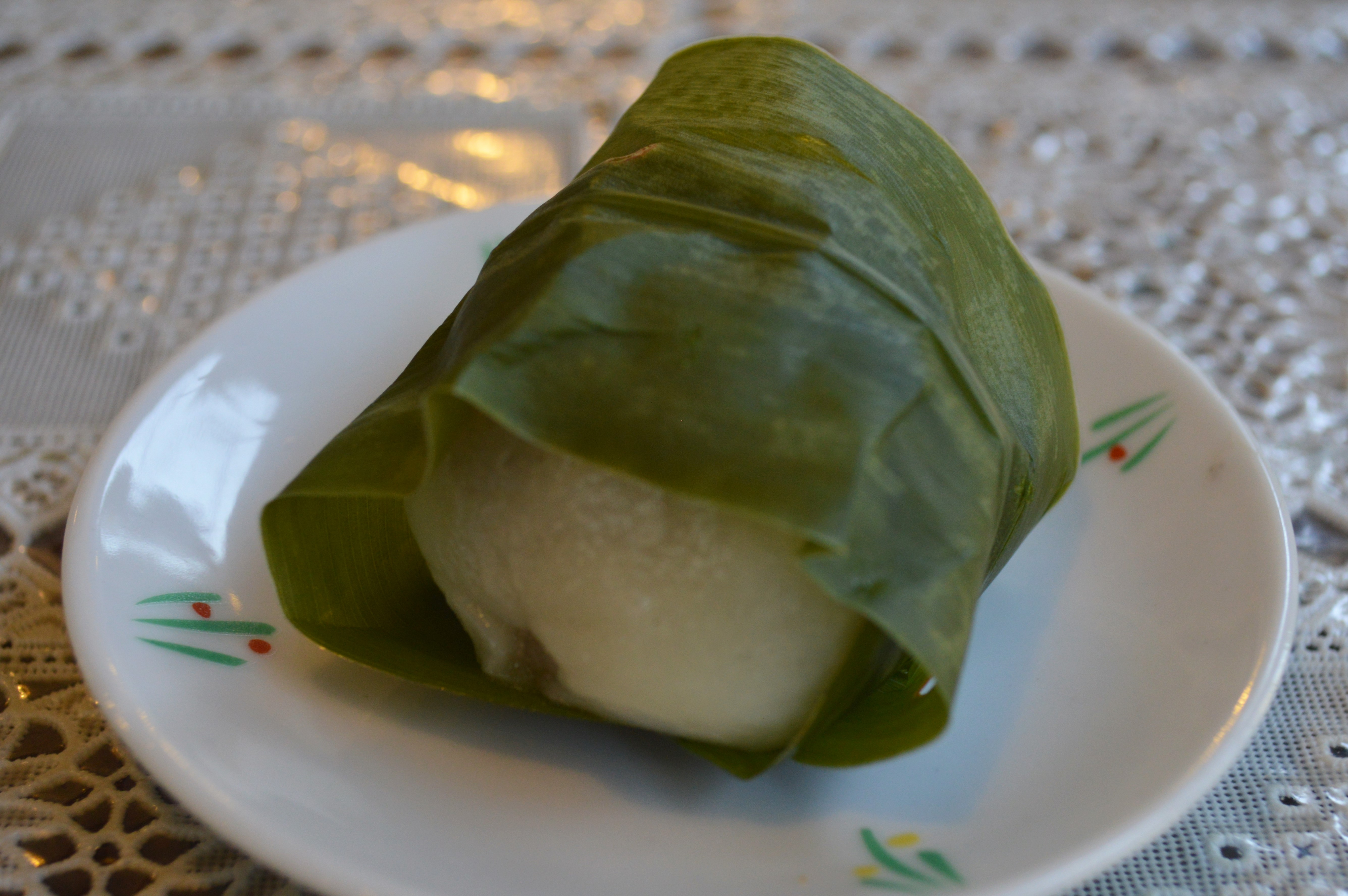 みょうがぼち。岐阜県本巣郡北方町の和菓子舗「恵比須屋」。